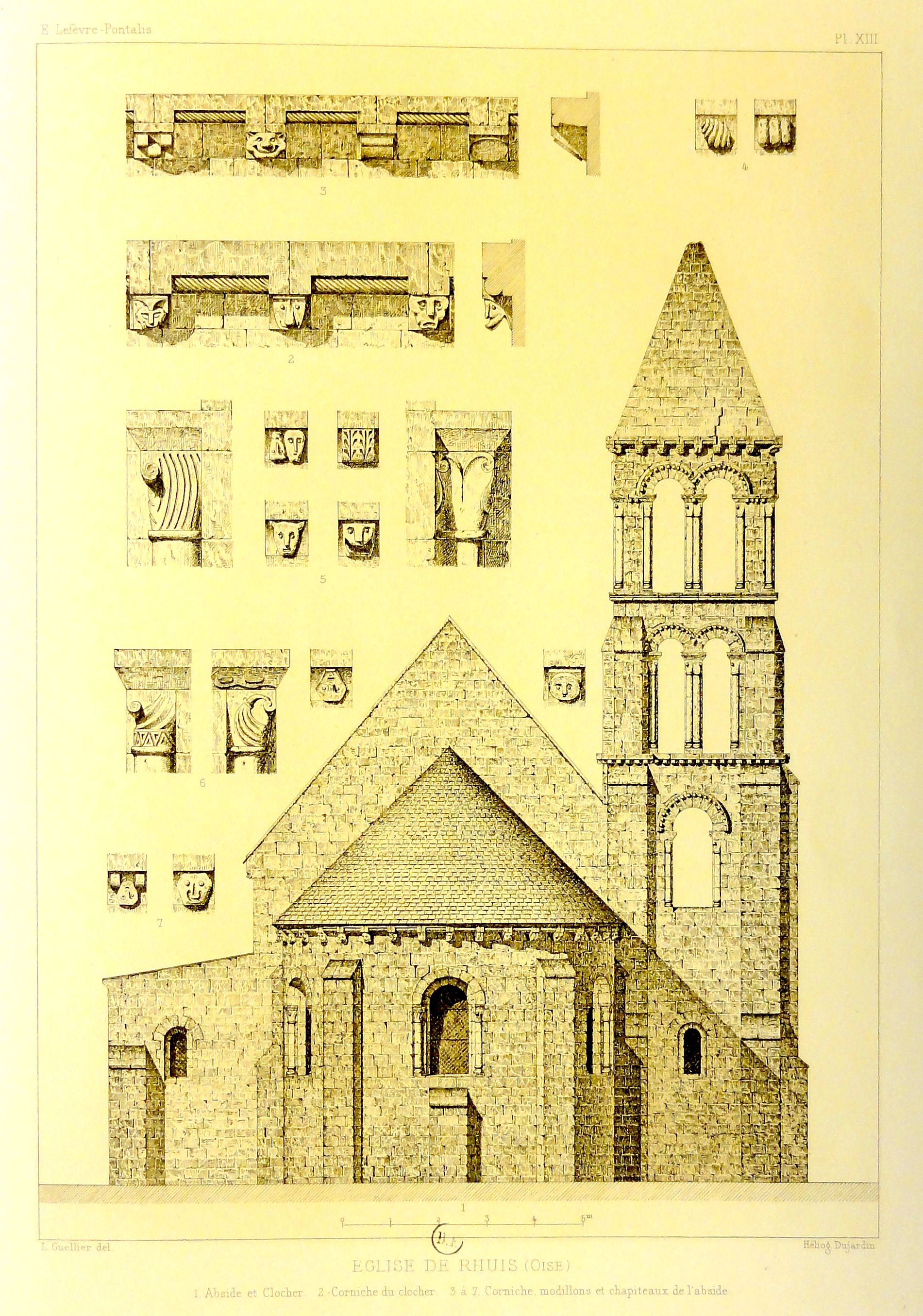 Elévation est et divers détails.